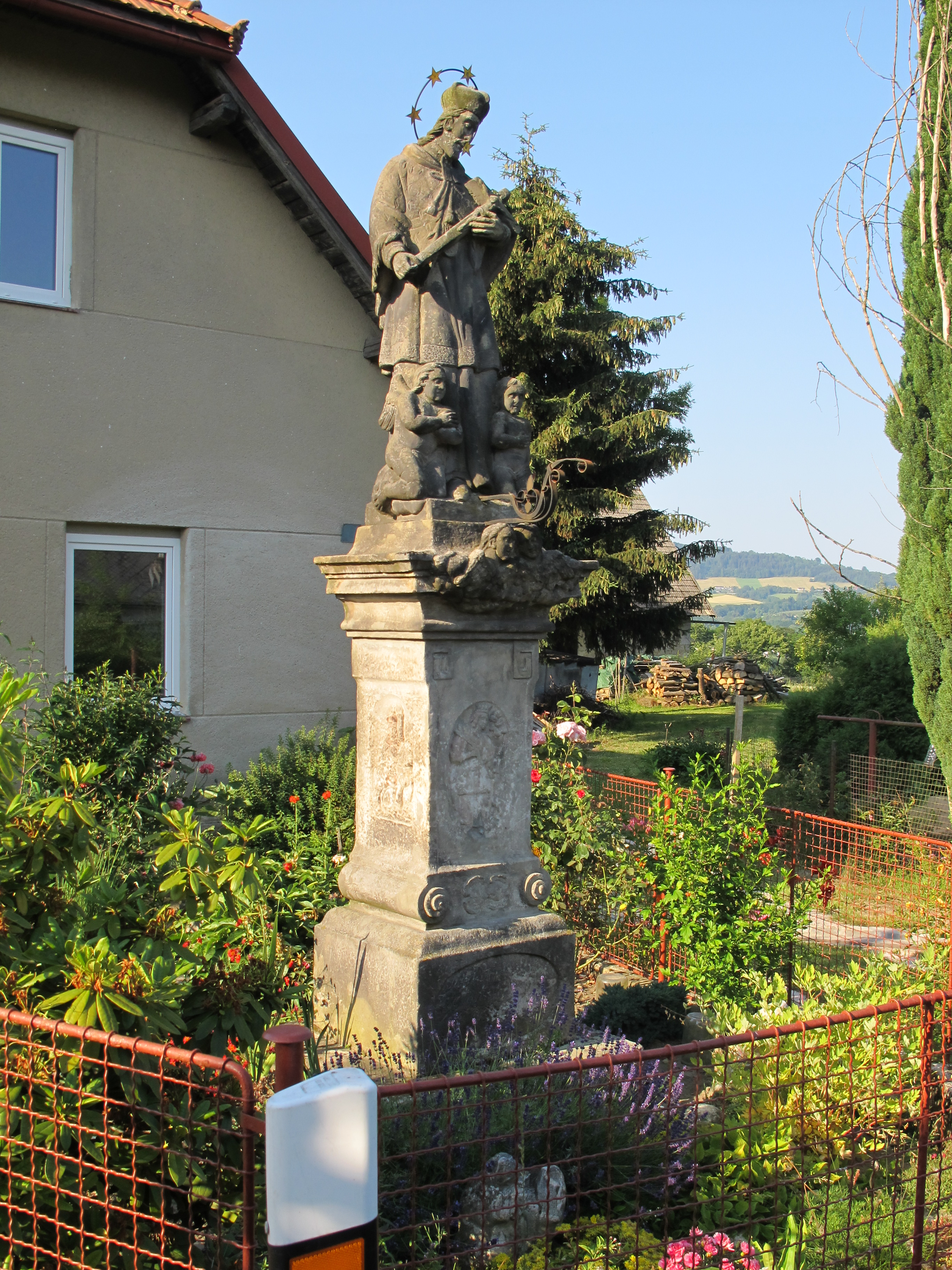 Socha svatého Jana Nepomuckého, před čp. 6, Blatec (Rovensko pod Troskami).